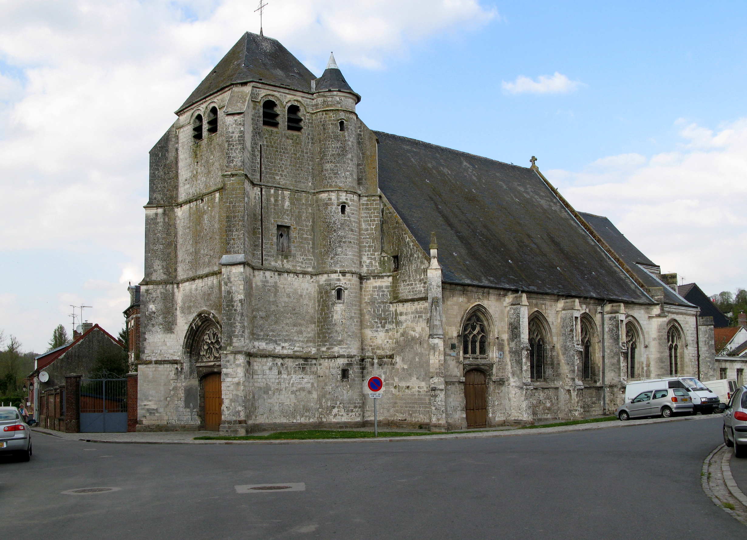 Frévent (Pas-de-Calais, France) - L'église. .